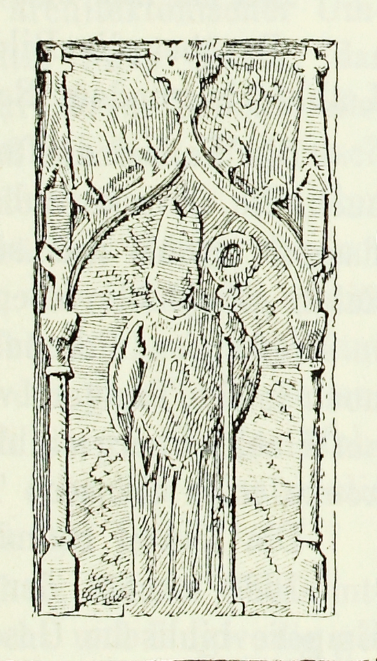 Zeichnung Cornelius Gurlitts vom Epitaph des Weihbischofs Niclas von Meißen, das sich in der Bartholomäus-Kirche in Dresden befand